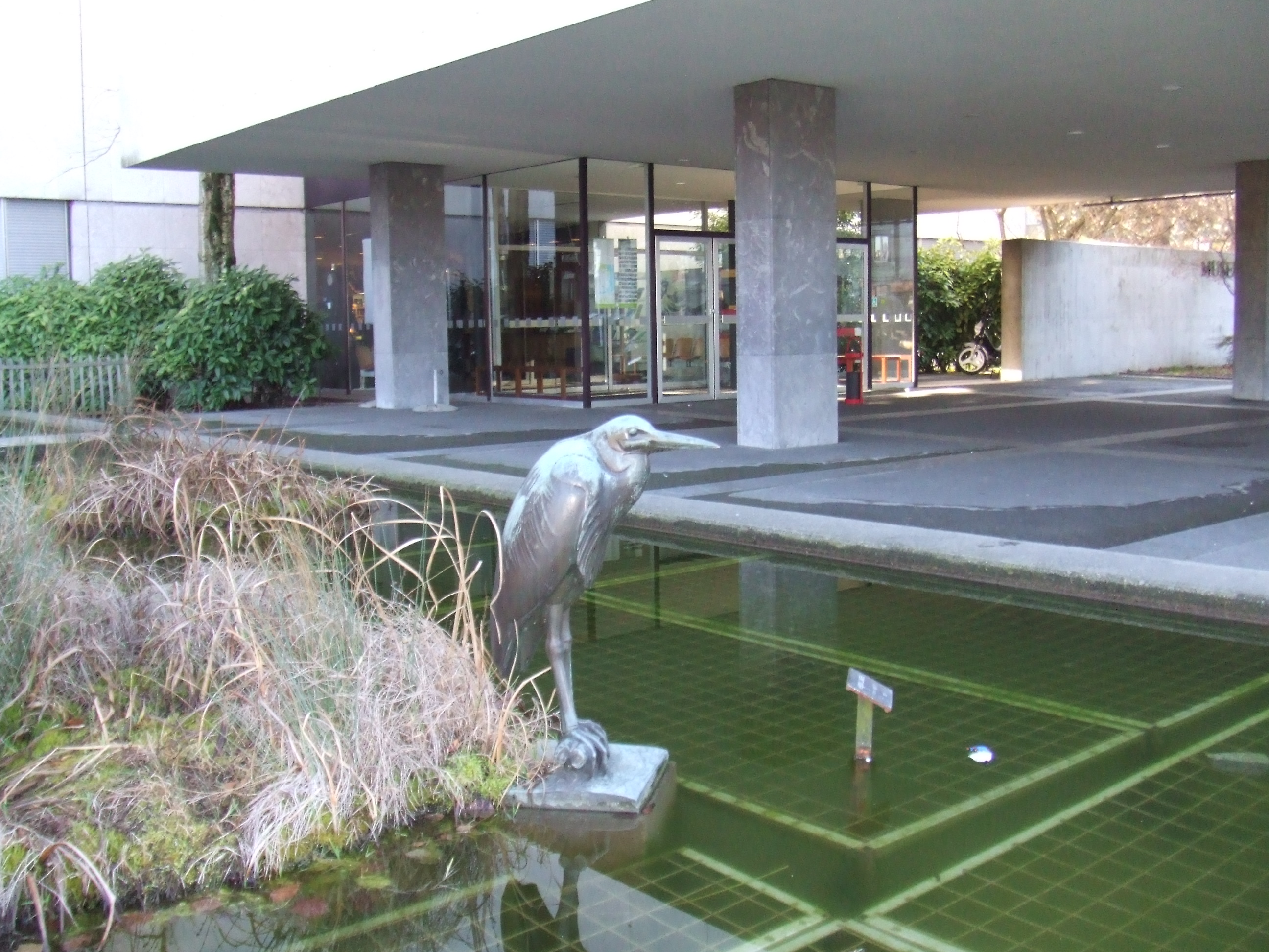 Héron Cendré (Ardea cinerea), sculpture en bronze de Robert Hainard, devant le muséum d'histoire naturelle de Genève